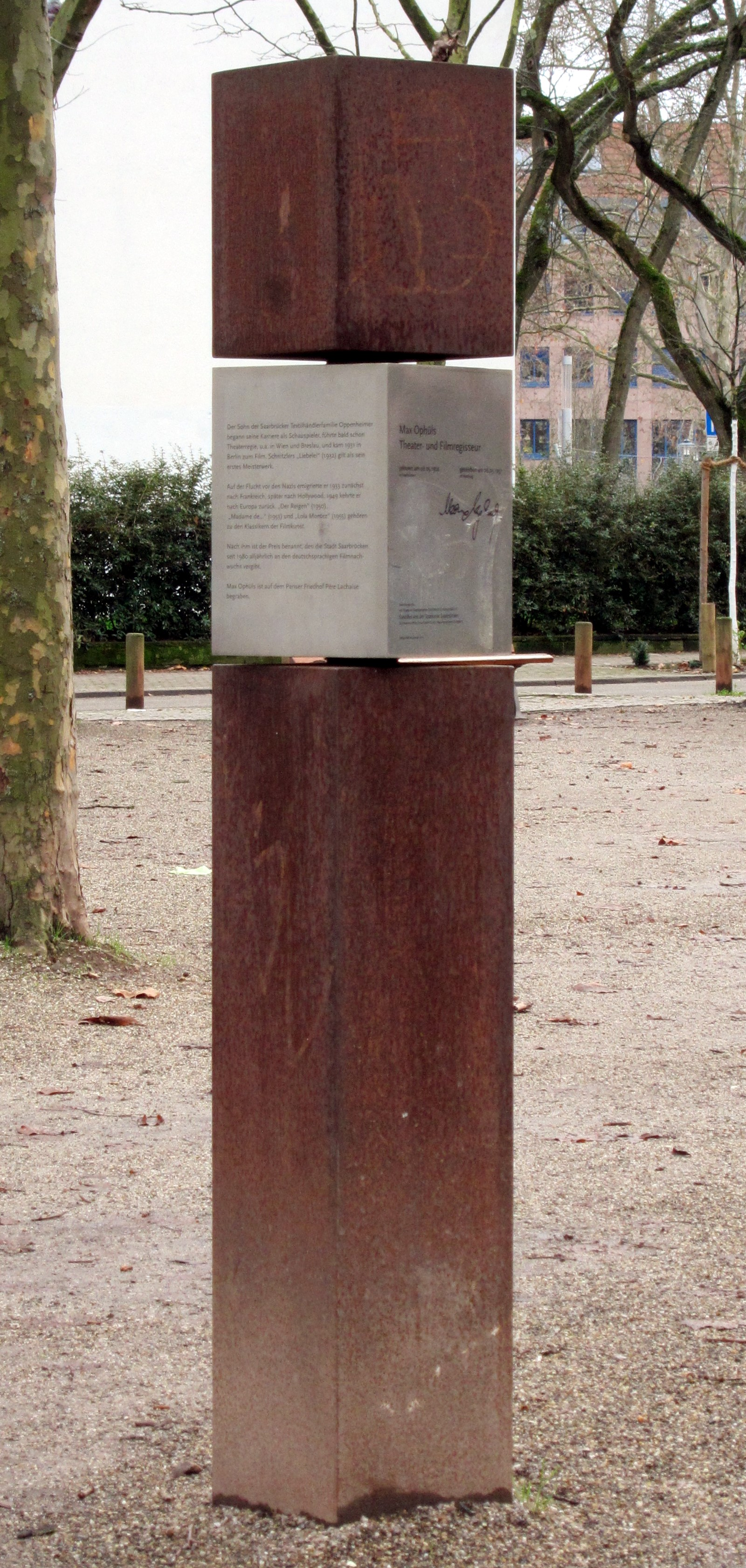 Stele zum Gedenken an Max Ophüls auf dem nach ihm benannten Platz in Saarbrücken